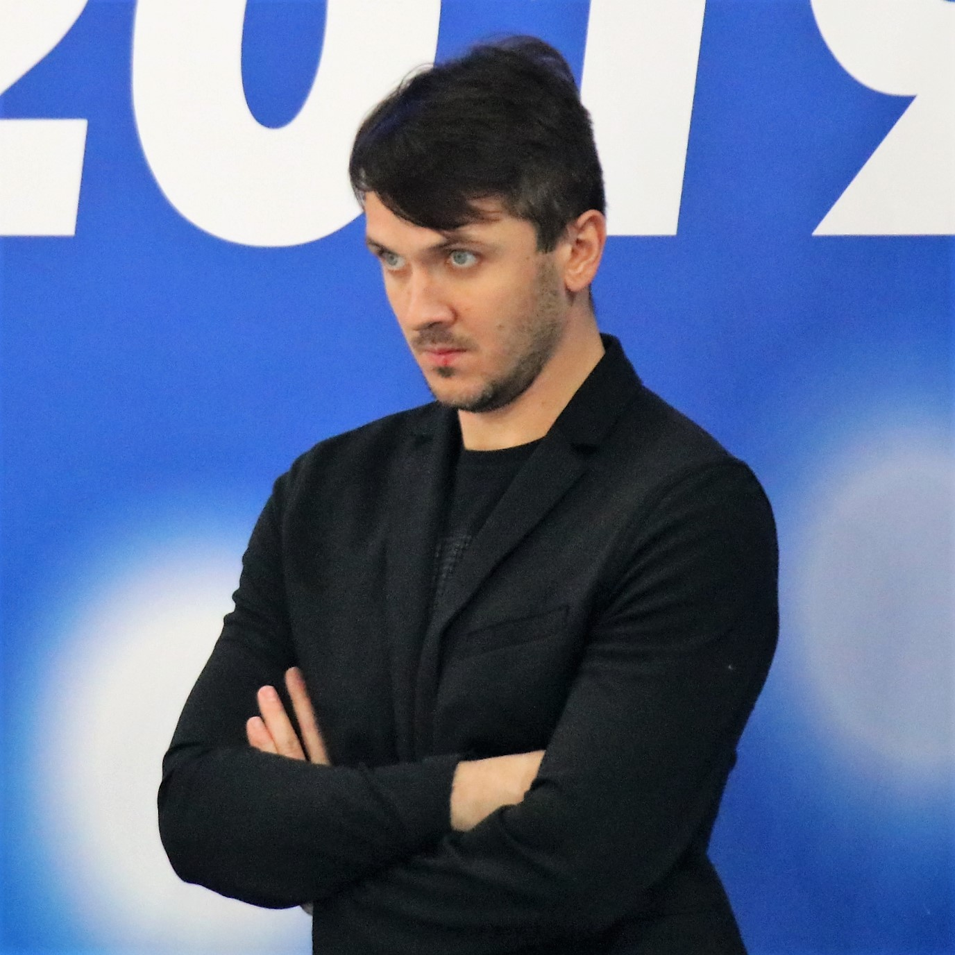 Максим Траньков в качестве тренера спортивной пары Евгения Тарасова / Владимир Морозов на чемпионате России по фигурному катанию на коньках 2019